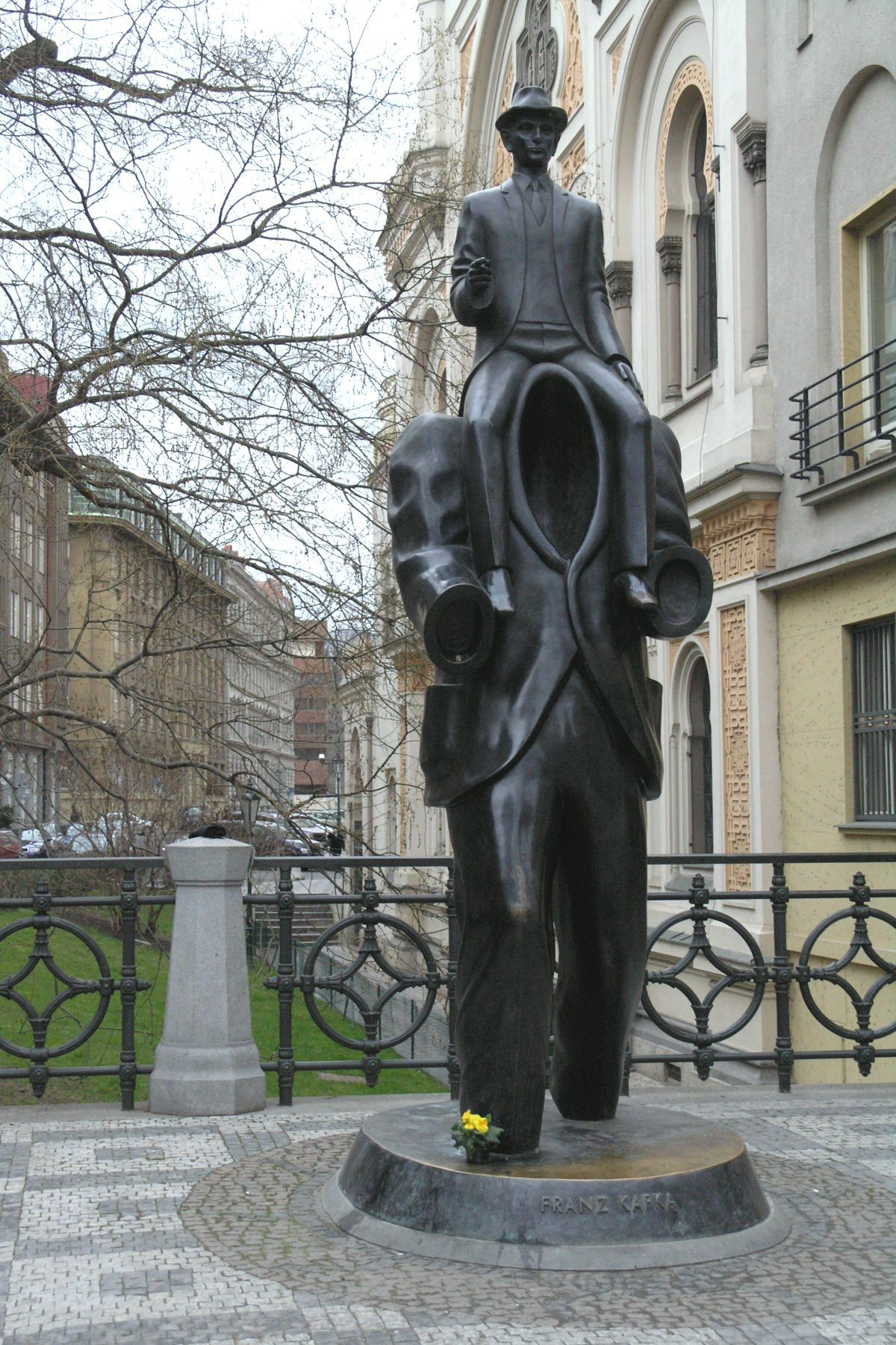 Pomník Franze Kafky od Jozefa Róny